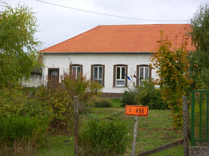 Iskolaépület (Rétalap, Magyarország)